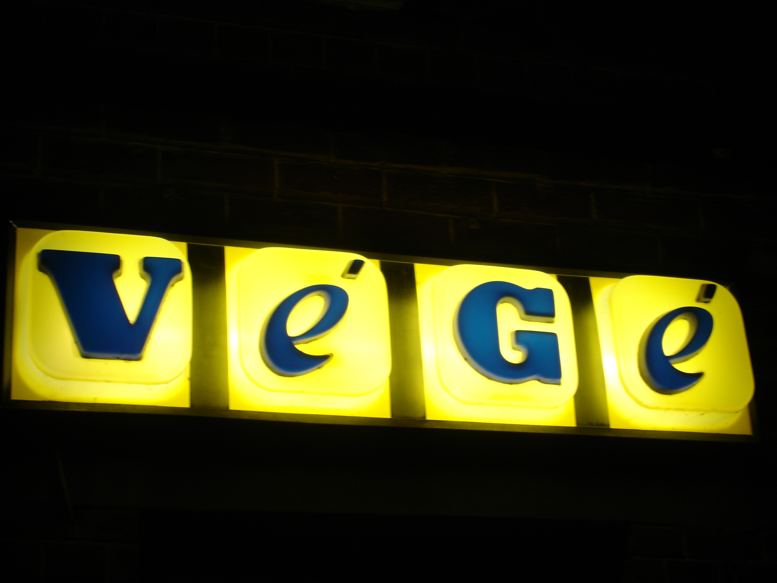 Neonreclame van een voormalige VéGé-winkel in Oostvleteren